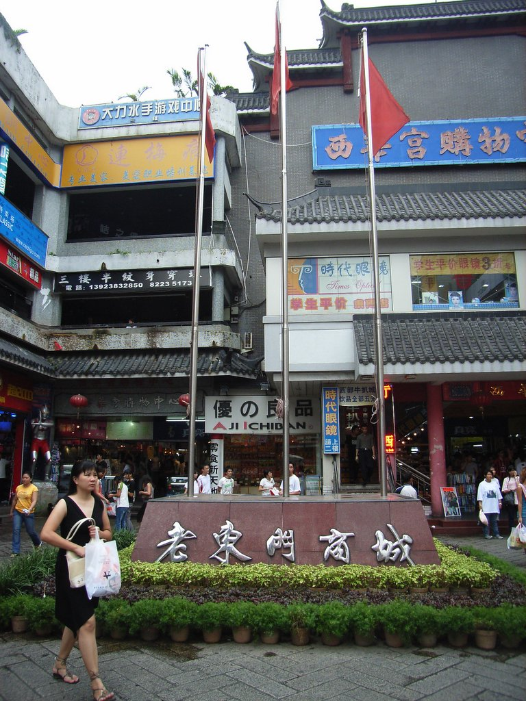 東門商業區, 又是"東門老街", 它是深圳一處有名的步行街 DM579